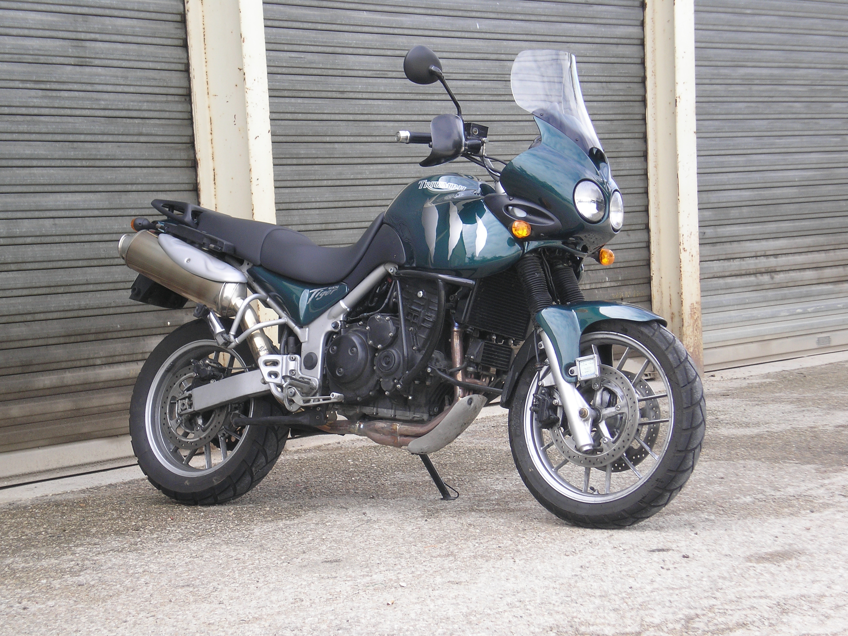 Triumph Tiger 955i (2004)